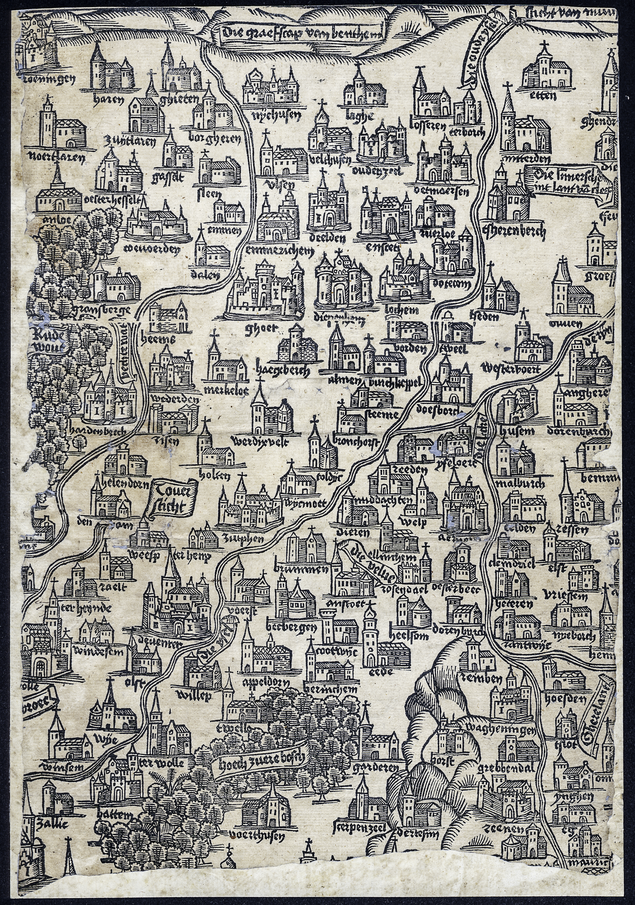 Kaart van het Oversticht van het Bisdom Utrecht. Gemaakt rond 1524. Een van de overgeleverde fragmenten van de Kerkenkaart (de andere is van Friesland), die in een Frans huishoudboek in een 16e eeuws manuscript zaten, dat weer in de band van een boek uit ca. 1785. De kaart klopt cartografisch niet en is als houtgravure waarschijnlijk gekopieerd van een manuscriptkaart die Hendrik van Beieren moest verleiden om snel zijn ambt als bisschop te aanvaarden. De kerken komen niet overeen met de afbeeldingen op de kaart van Jacob van Deventer en zijn waarschijnlijk fantasierijk uitgebeeld (bron).